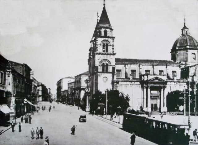 Convoglio tranviario in p. Duomo ad Acireale